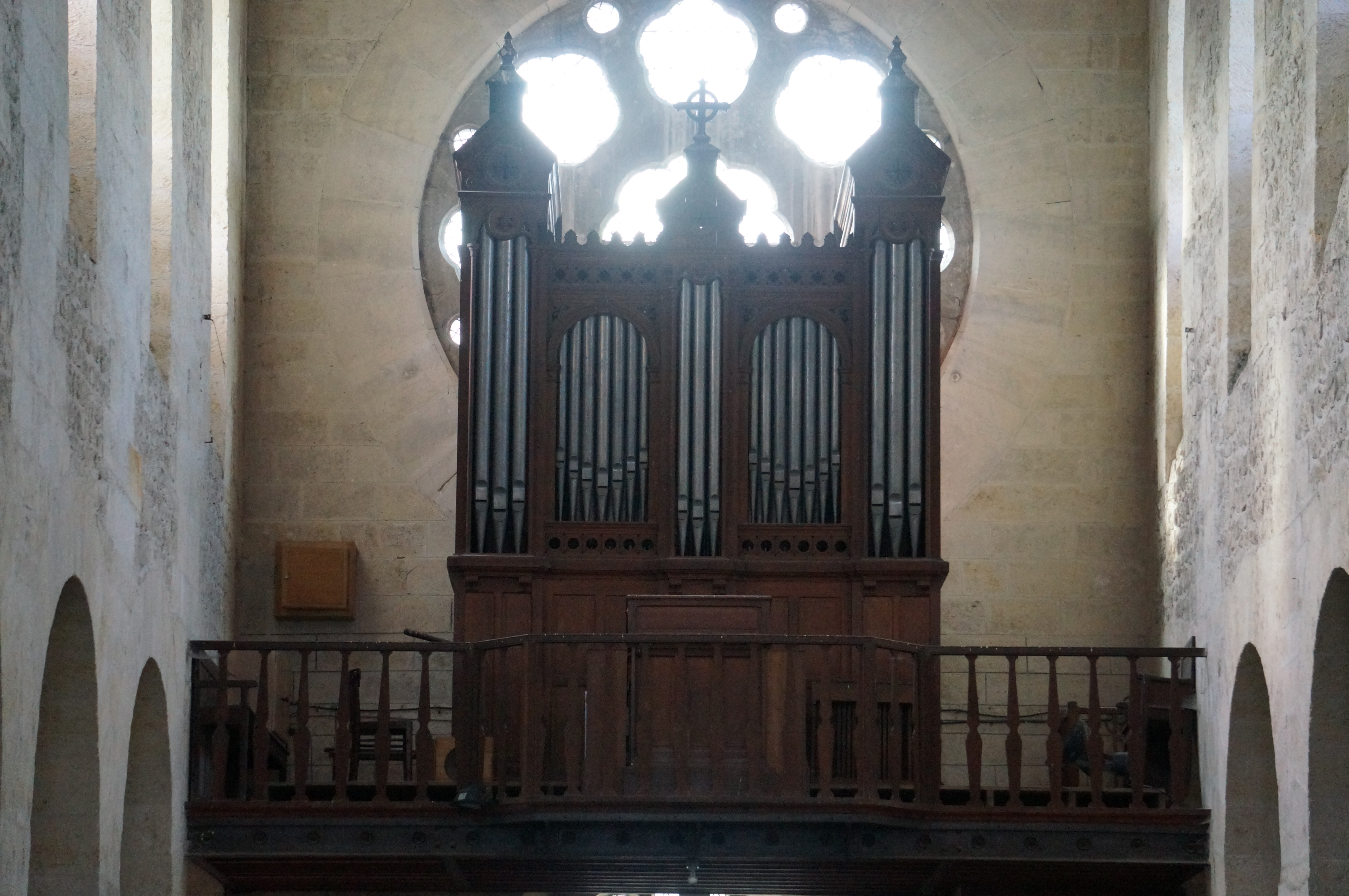 de l'Église Saint-Jean-Baptiste (Vaux-sous Laon.